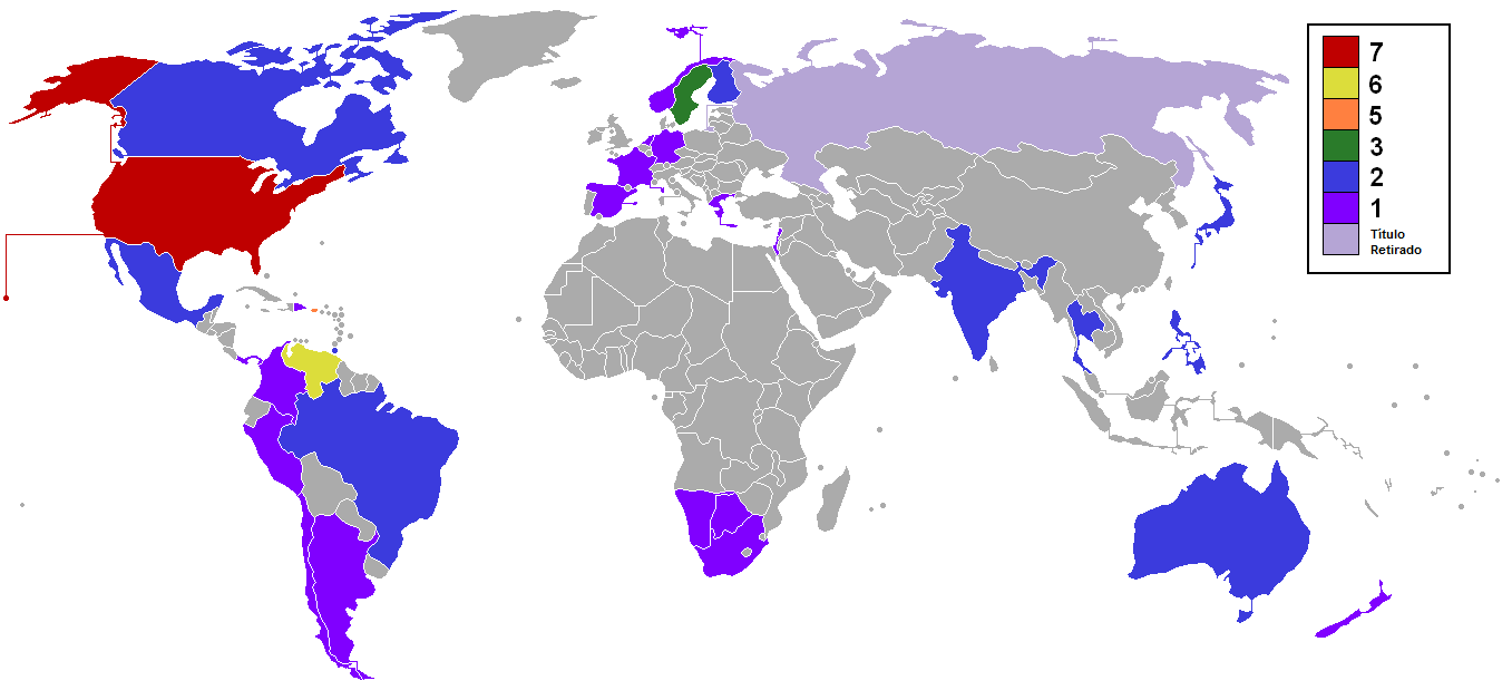 Países ganadores de Miss Universo